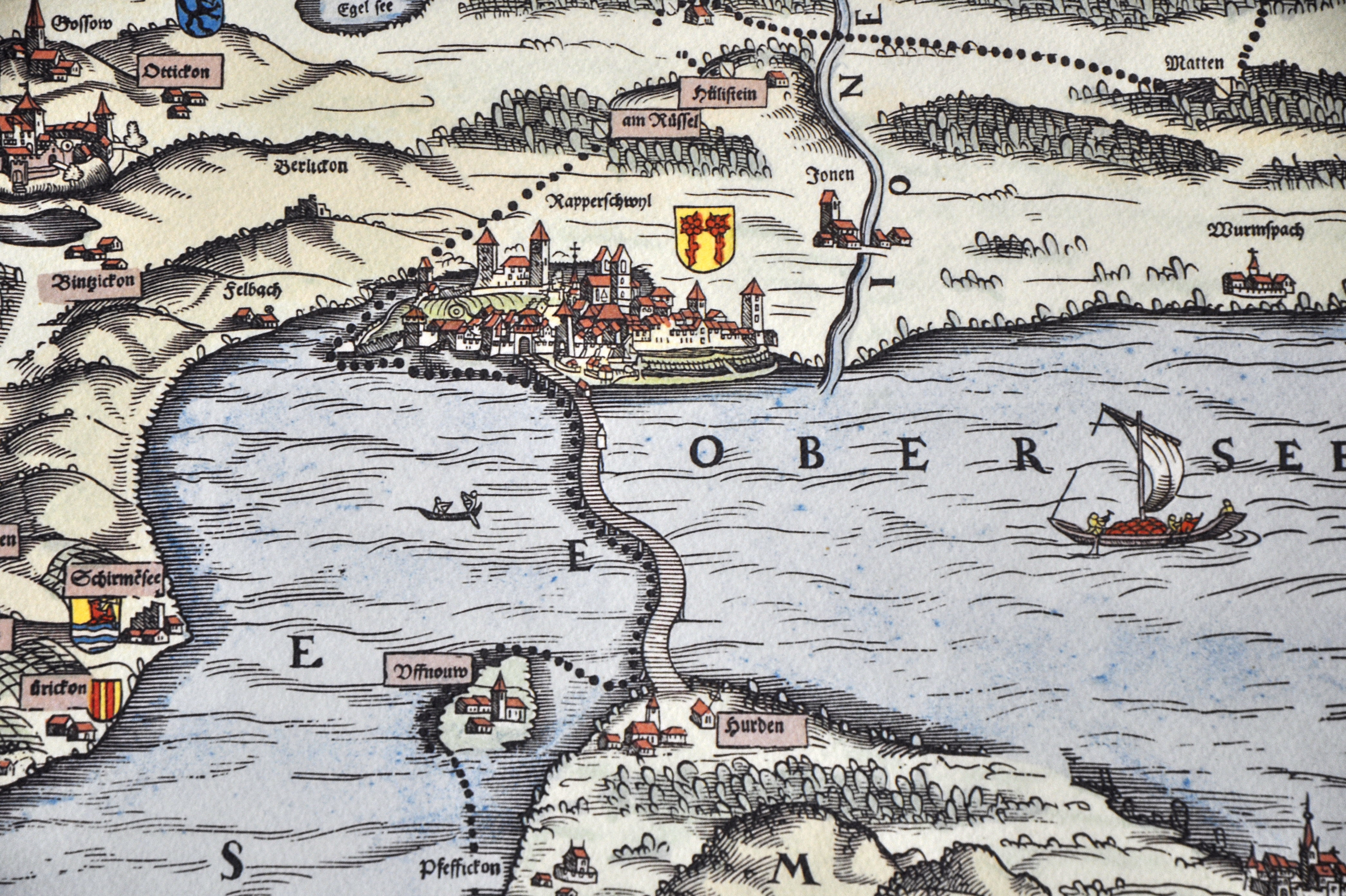 Das obere Zürichseegebiet um Rapperswil (SG) mit den ausgedehnten Wäldern (Rütner und Joner Wald) auf der Karte von Josias Murer aus dem Jahr 1566. Nebst heutigen Gemeinden – u.a. links Grüningen, oben Bubikon und Rüti (ZH), rechts Jonen (Jona SG), unten Insel Ufenau und Hurden (SZ) – sind die Rütner Weiler Hülistein, Rüssel und Matten eingezeichnet. Der Hüllistein ("Hohler Stein") an der Strasse zwischen Rapperswil und Rüti war in jener Zeit weithin als ein Naturschauspiel bekannt, ein Wasserfall unter einer Naturbrücke. Deutlich eingezeichnet sind nebst anderen Details die Holzbrücke Rapperswil-Hurden und rechts die Jona (Ione), welche dem heutigen Ortsteil Jona seinen Namen gab.